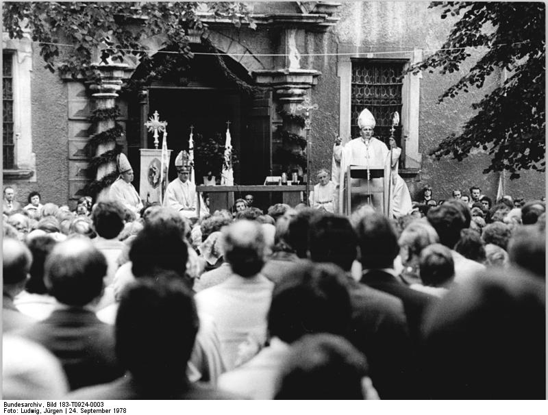 ADN-ZB-Ludwig-24.9.78-B- Erfurt: 300 Jahre Wallfahrtskirche Worbis - In Worbis feierten am 24.9.78 die katholischen Bürger des Eichsfeldes das 300jährige Bestehen der St. Antonius-Kirche, die in den vergangenen Jahren mit erheblichen Zuschüssen der Staatlichen Denkmalpflege restauriert worden ist. Höhepunkt war ein Festgottesdienst mit Kardinal Alfred Bengsch, hier bei der Predikt vor der Barockkirche. Daran nahmen auch Bischof Hugo Aufderbeck (Erfurt, links) und weitere Würdenträger der katholischen Kirche teil.